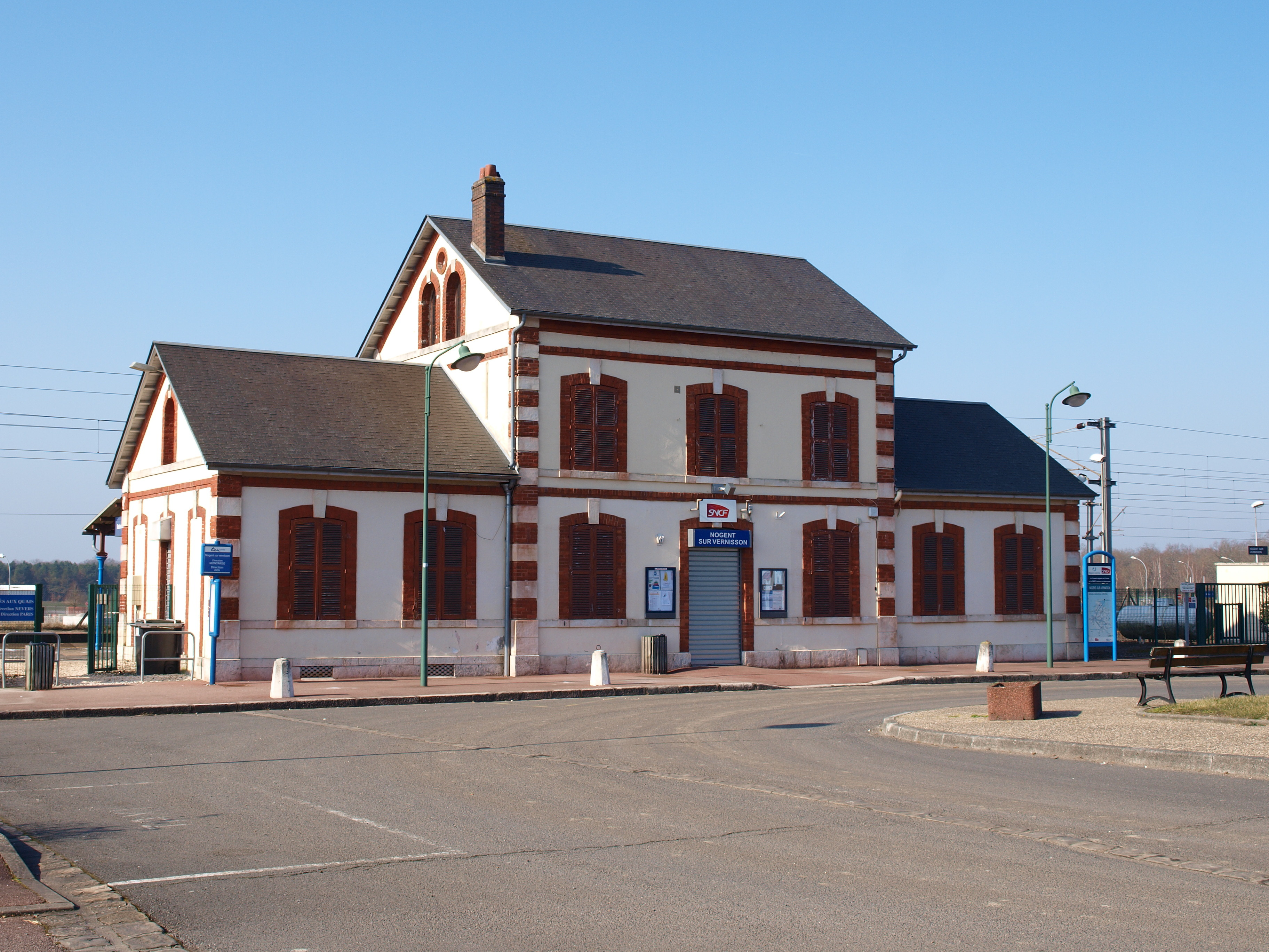 Nogent-sur-Vernisson (Loiret, France)